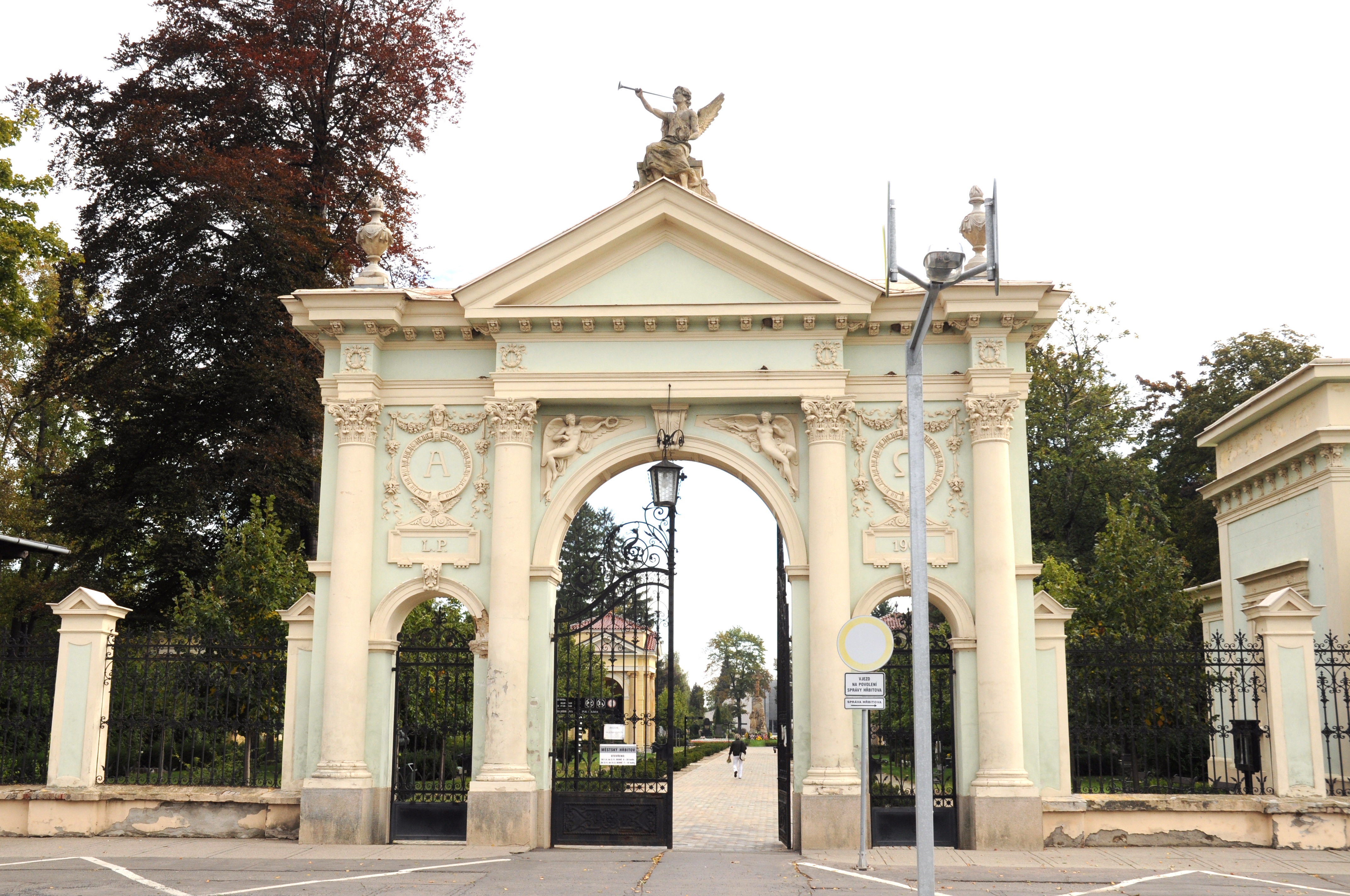 Hřbitov městský (Prostějov), Brněnská, Prostějov